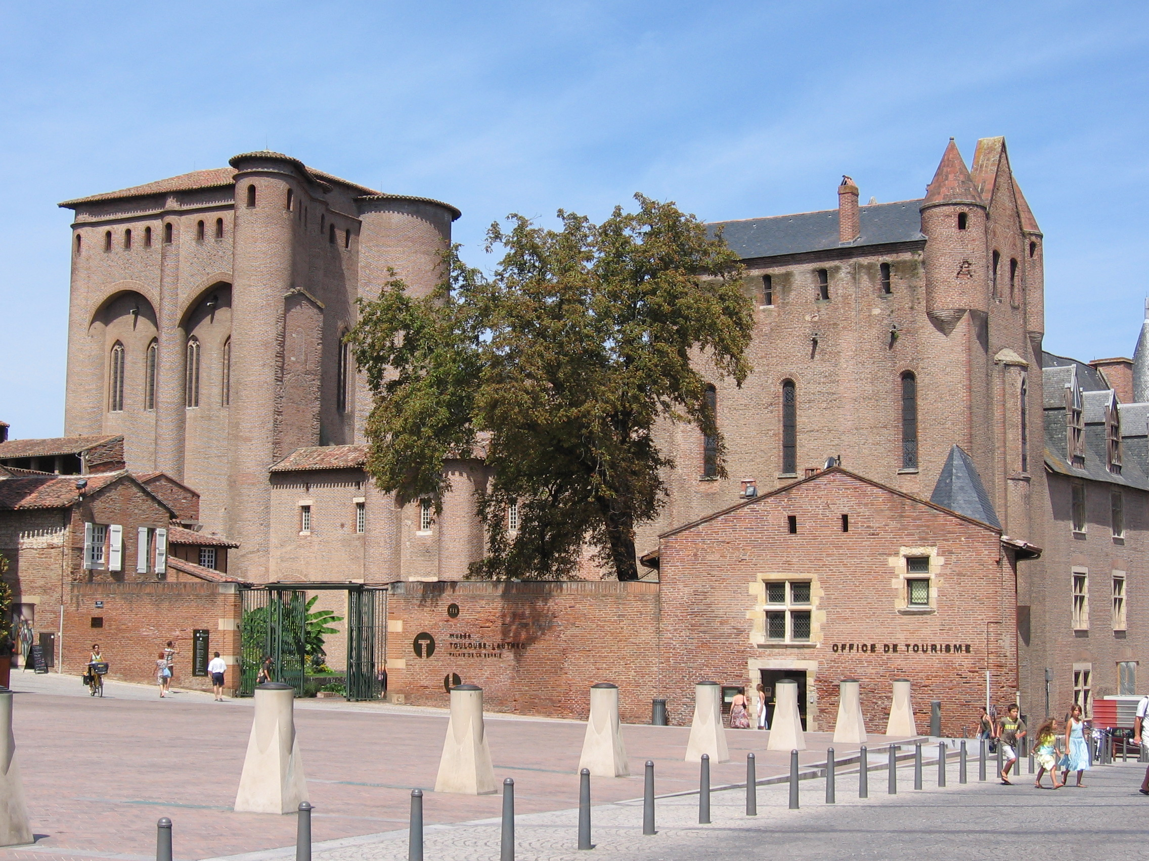 Museo Toulouse Lautrec, Albi, Francia